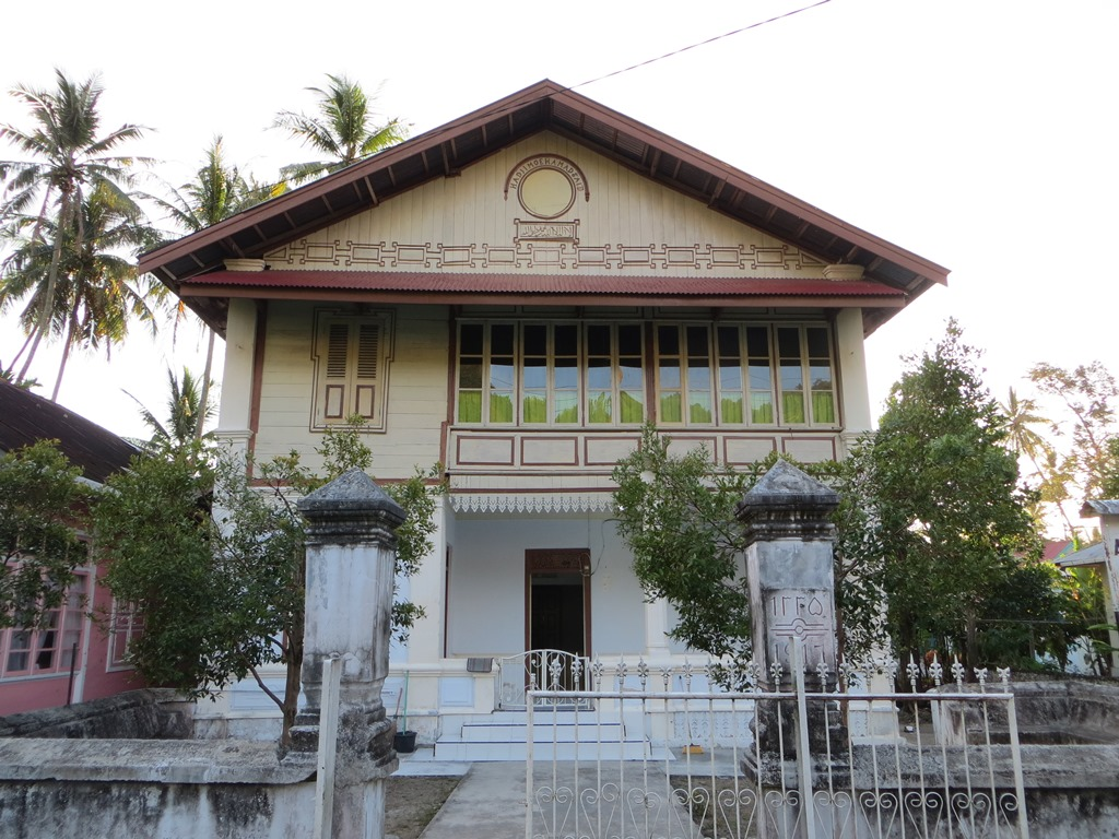 Rumah Rasuna Said. Jl. H. Udin Rahmani, Nagari Maninjau, Tanjung Raya, Agam Sumatera Barat